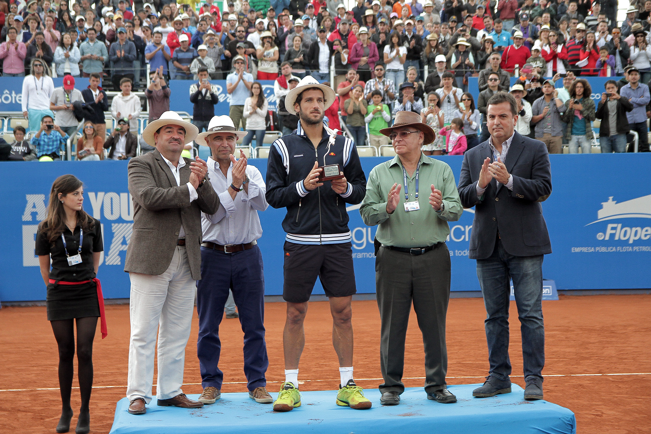 Quito, 08 feb (ANDES).- Final ATP 250 Ecuador Open Quito donde compitieron por el campeonato los tenistas Victor Estrella y Feliciano López. Fotografías: Carlos Rodríguez/ANDES.